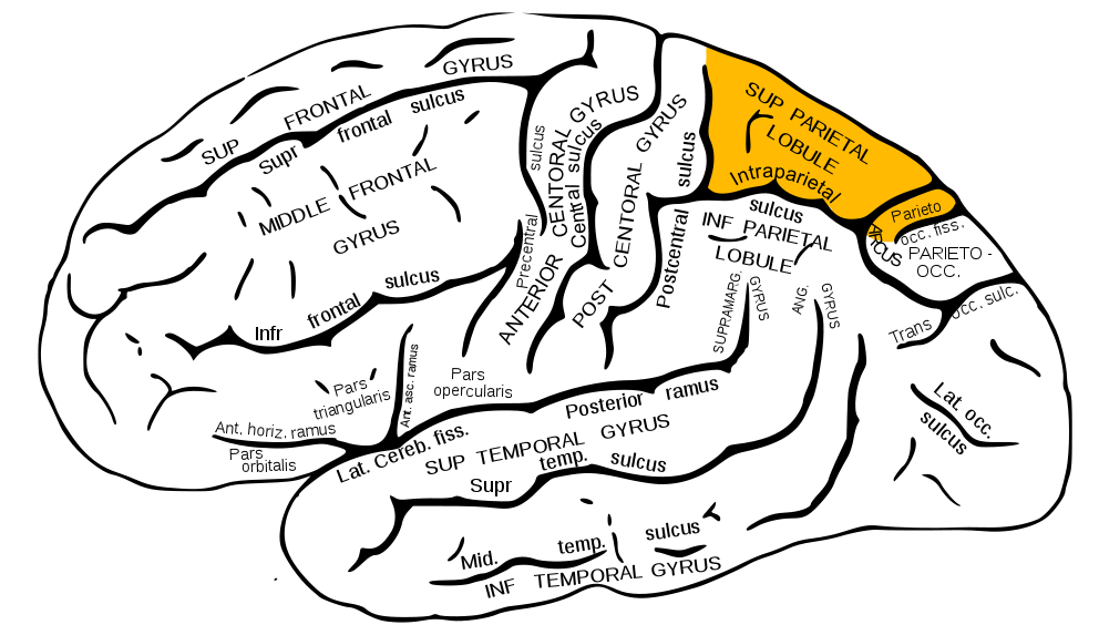 superior parietal lobule.